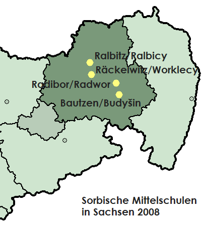 Verteilung sorbischer Mittelschulen in Sachsen, Stand 2008.